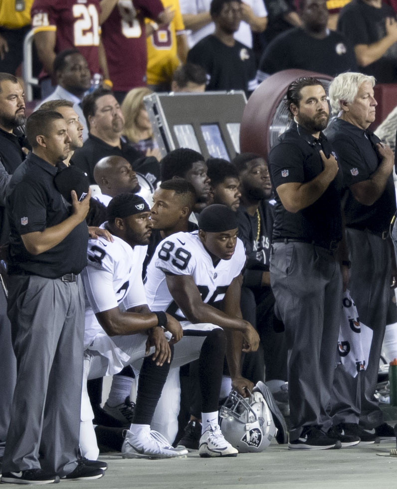 Raiders at Redskins 9/24/17